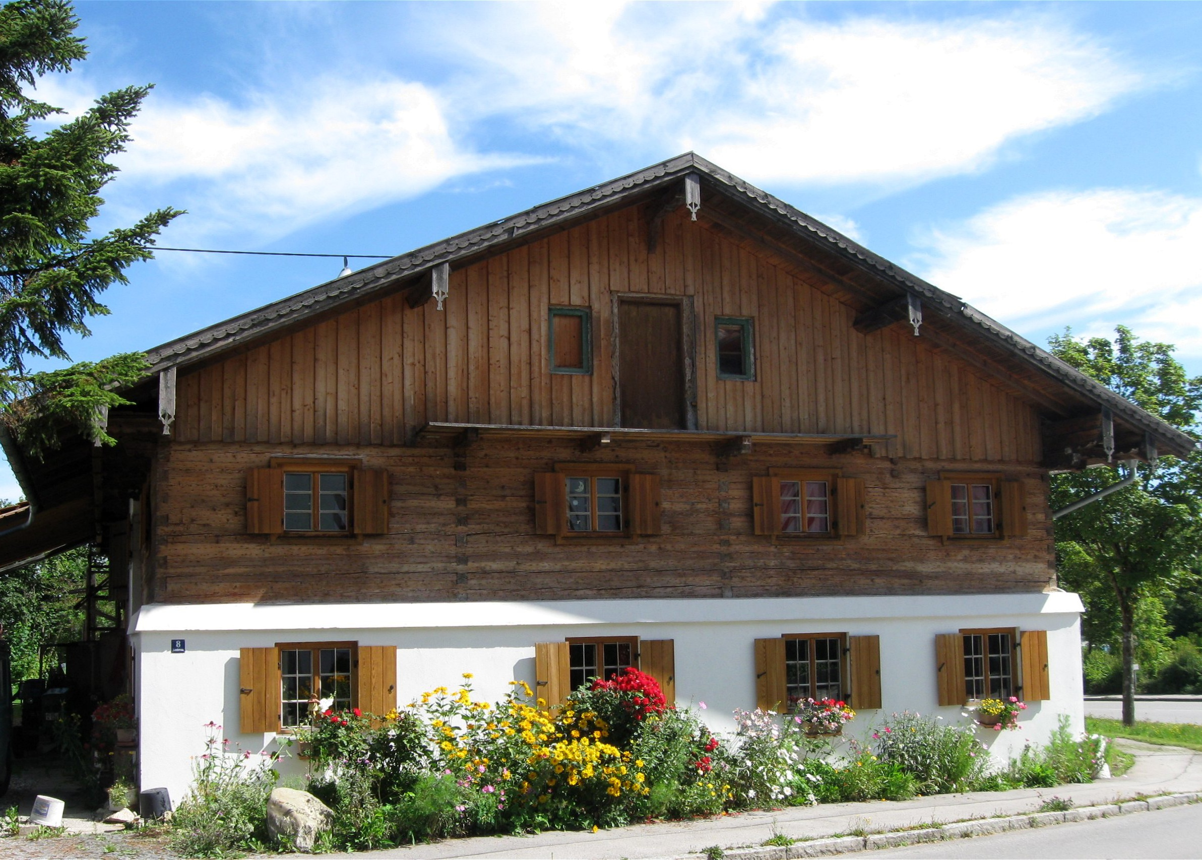 Schlossstraße 8. Bauernhof, in Hakenform, Wohnteil mit verputztem Blockbau-Obergeschoss und Hochlaube, bez. 1804.